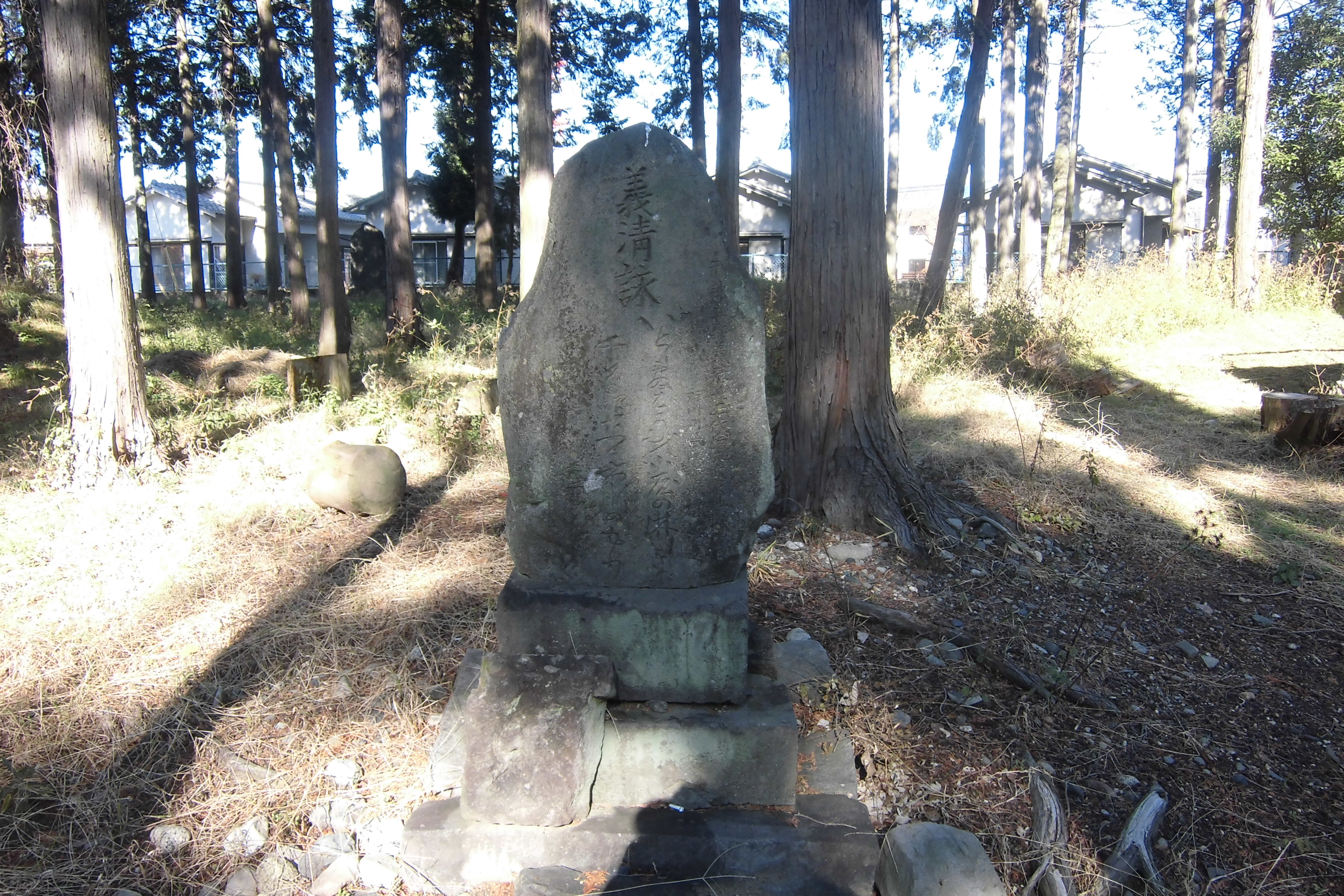 義清神社・歌碑（山梨県昭和町西条）